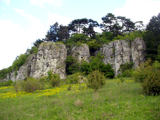 Заповідник «Медобори». філіал Кременецькі гори